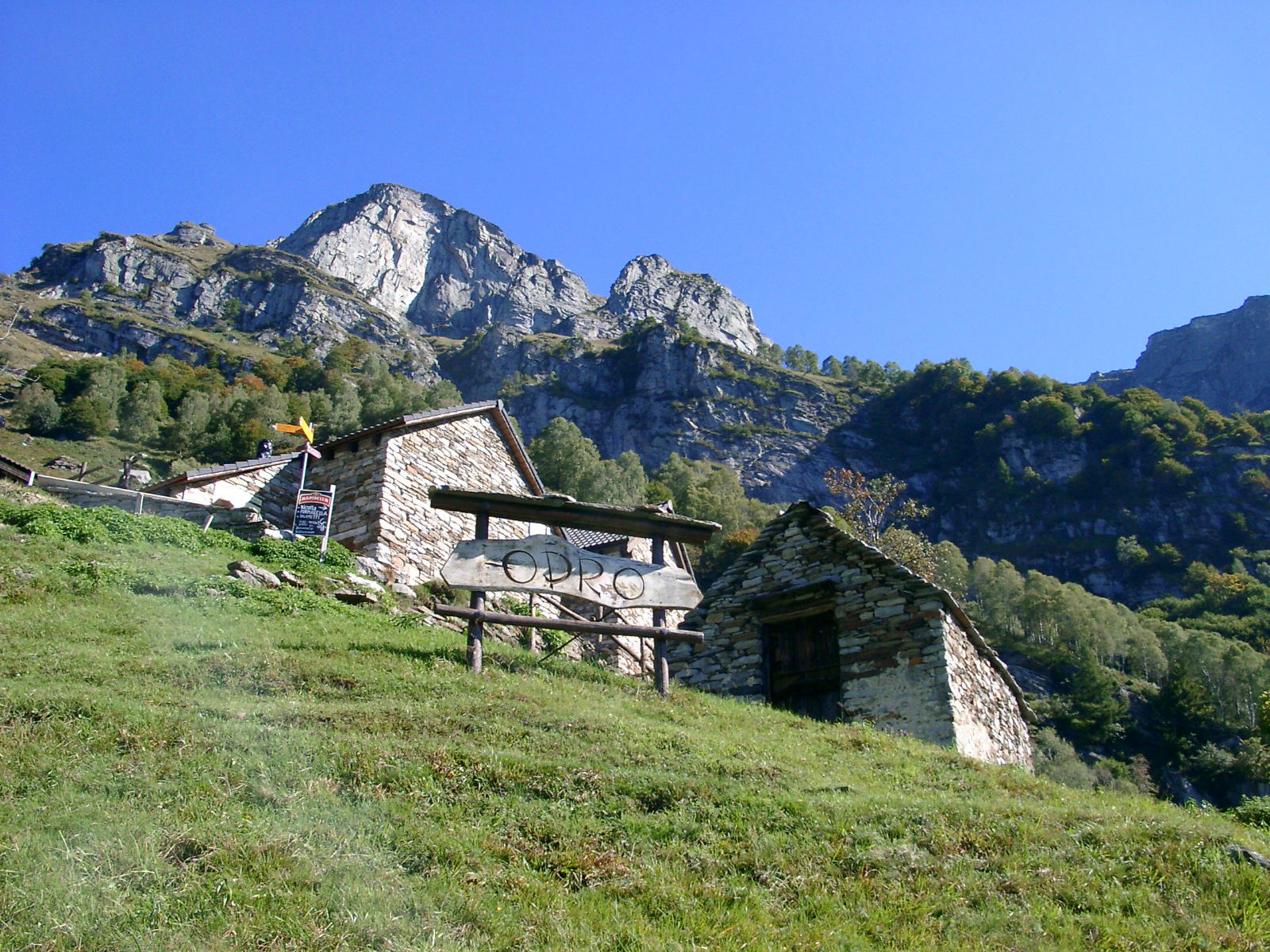 Blick zur Alp Odro. Odro ist eine Alp und Rustici-Siedlung (1240 m.ü.M.) oberhalb von Vogorno im Tessiner Valle Verzasca. Von Odro aus bietet sich ein atemberaubender Ausblick auf die Tessinerberge und auf einen Teil des Lago Maggiore.